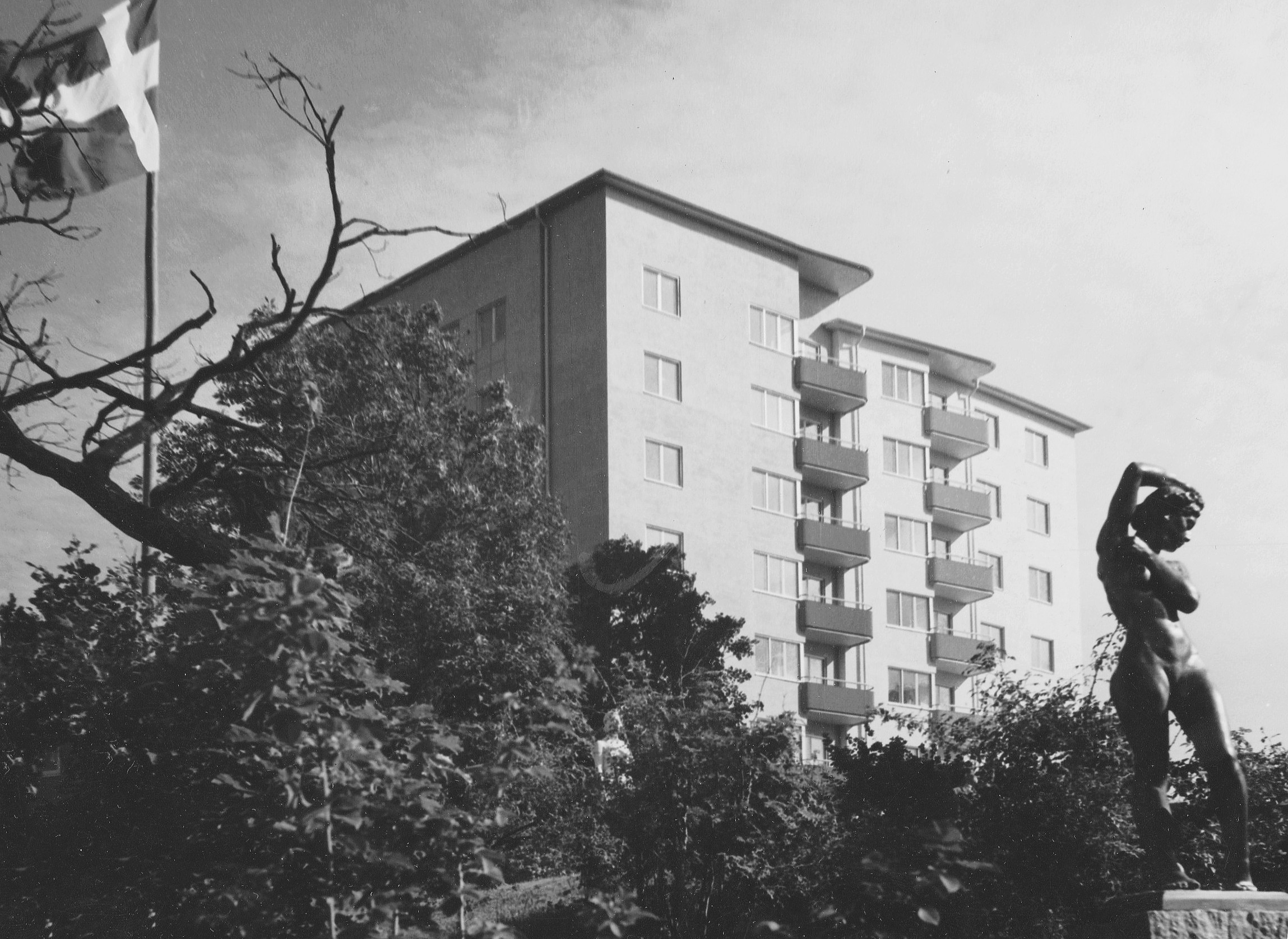 HSB:s punkthus på Pokalvägen, Reimersholme